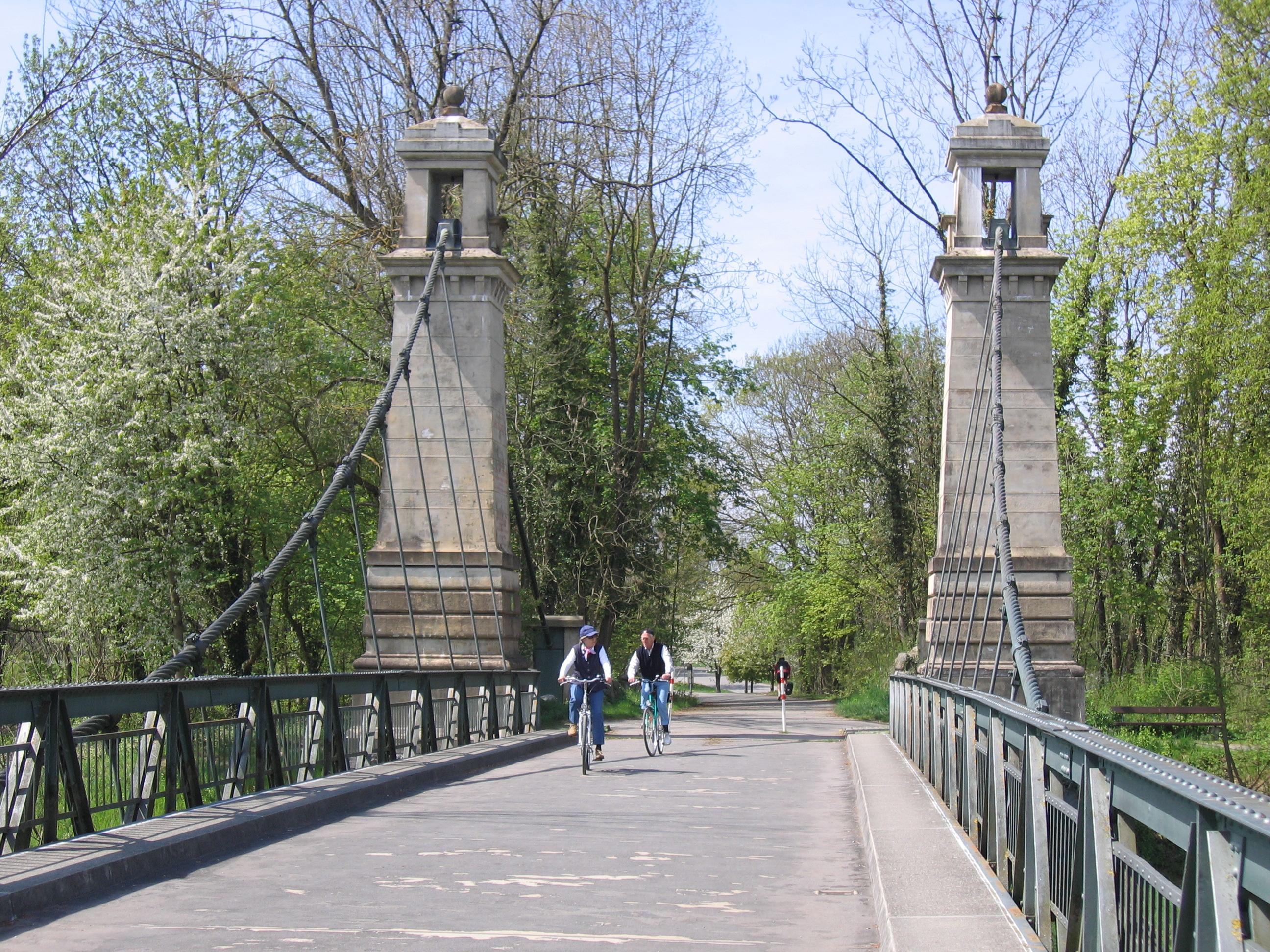 Deutschland - Baden-Württemberg - Bodenseekreis - Kressbronn am Bodensee/Langenargen: Argenbrücke